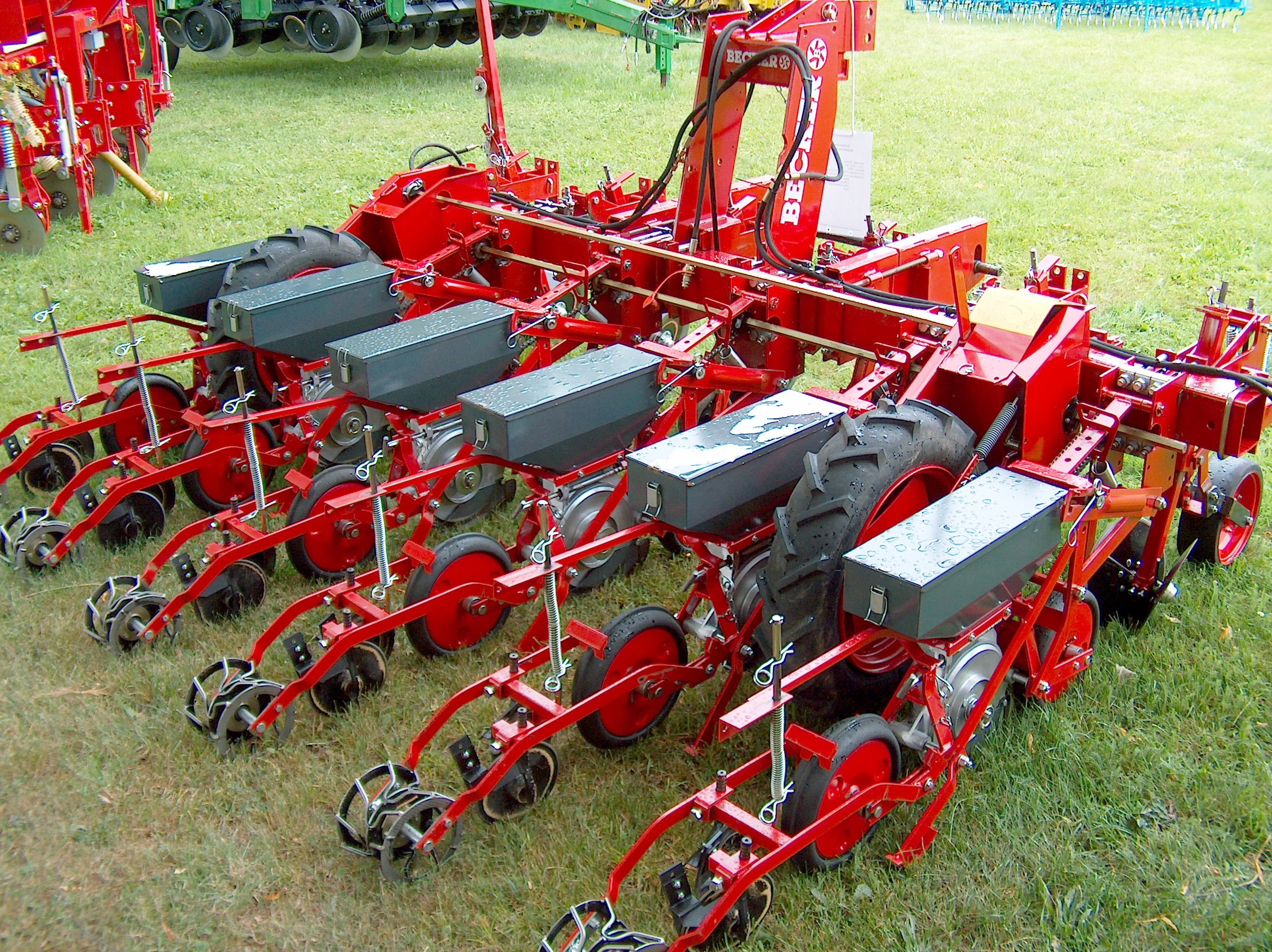 Zuckerrübeneinzelkornsägerät der Firma Becker, Typ C2000 06, Bj. 2000